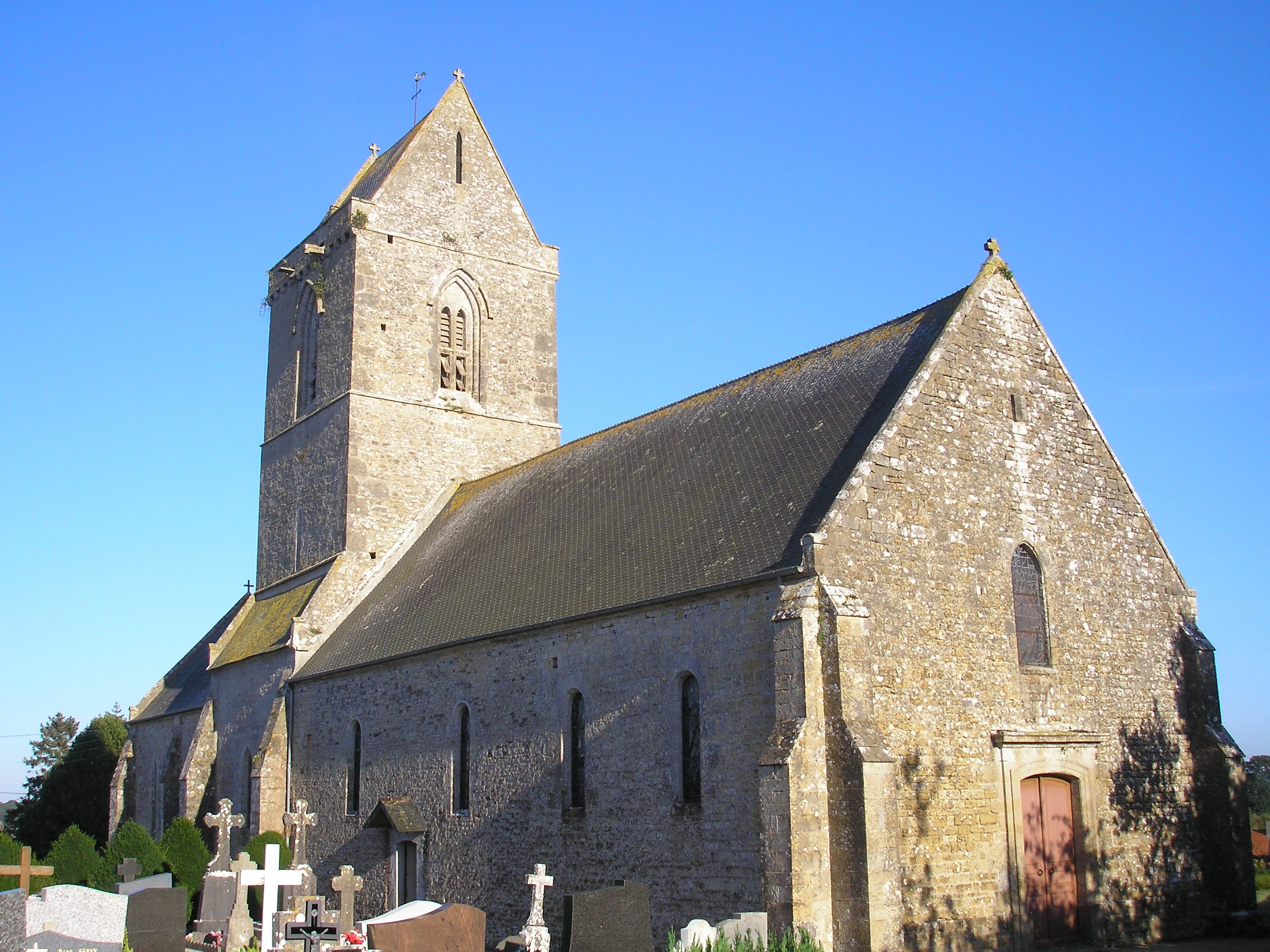 Vindefontaine (Normandie, France). L'église Saint-Martin.